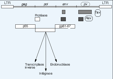 organisation génomique du HTLV